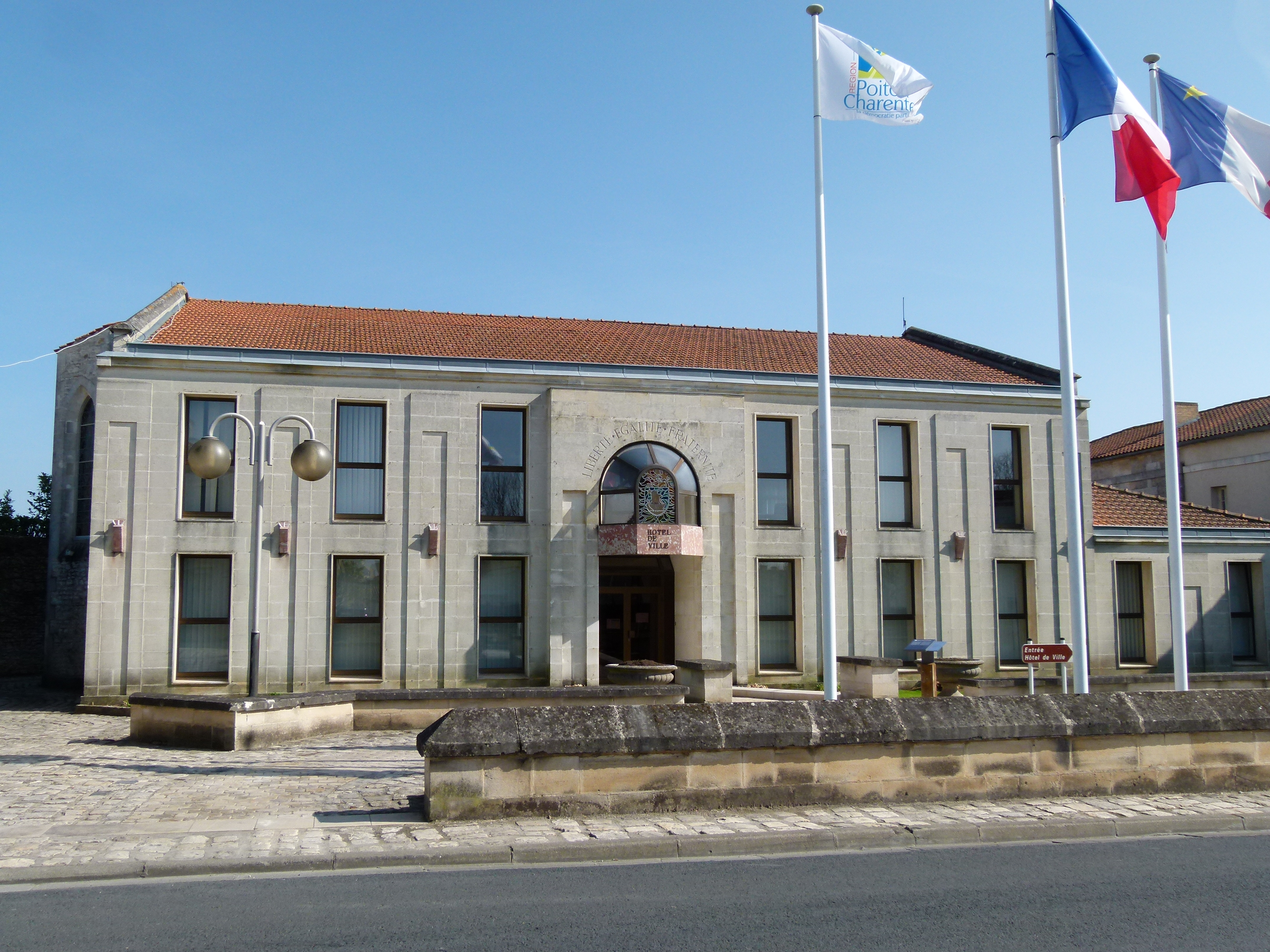 L'¨Hôtel de ville de Marennes (17) occupe les anciens locaux du Couvent des Récollets la première fois après la Révolution française, puis depuis 1987.